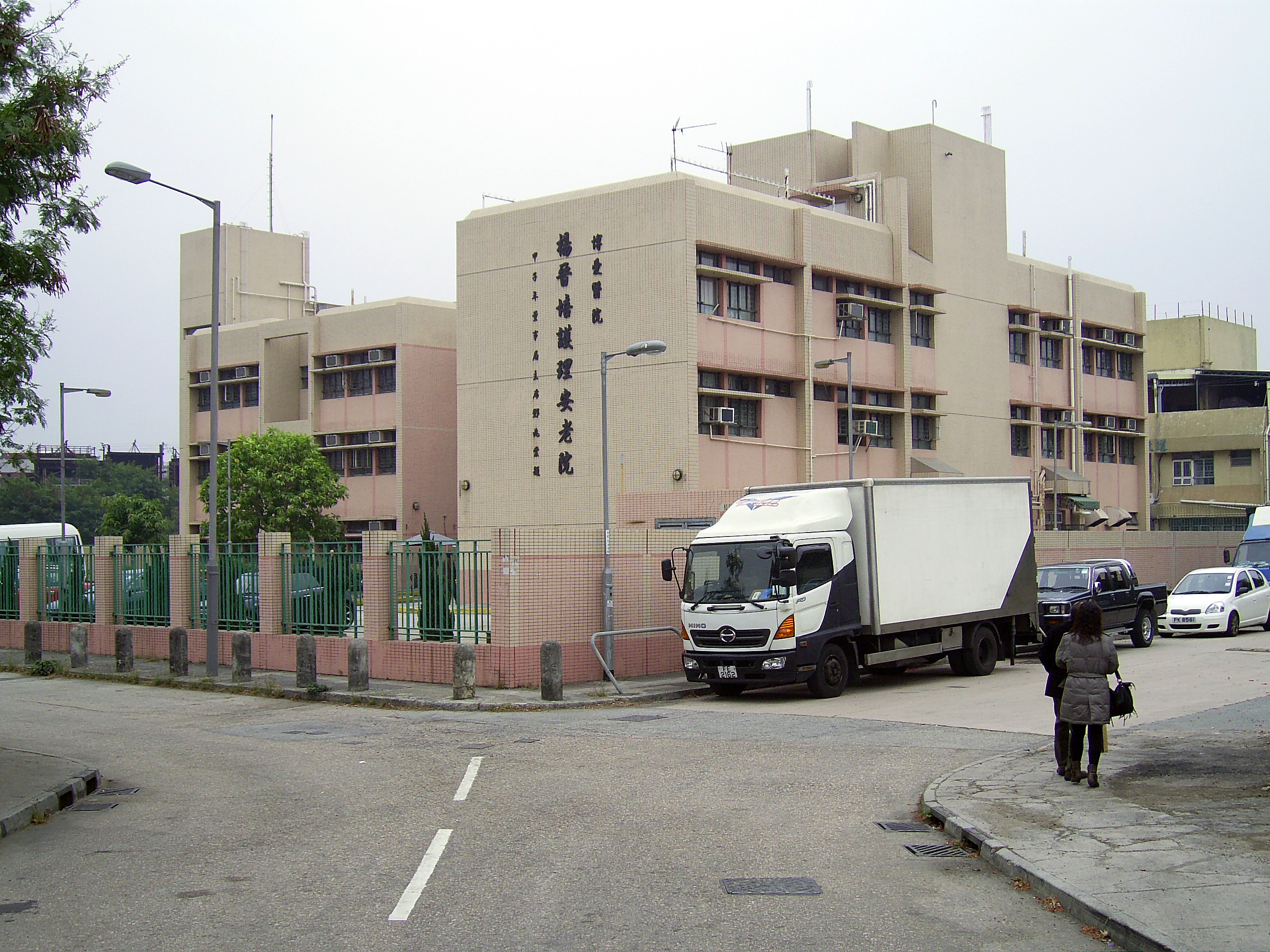 中文（香港）: 博愛醫院楊晉培護理安老院